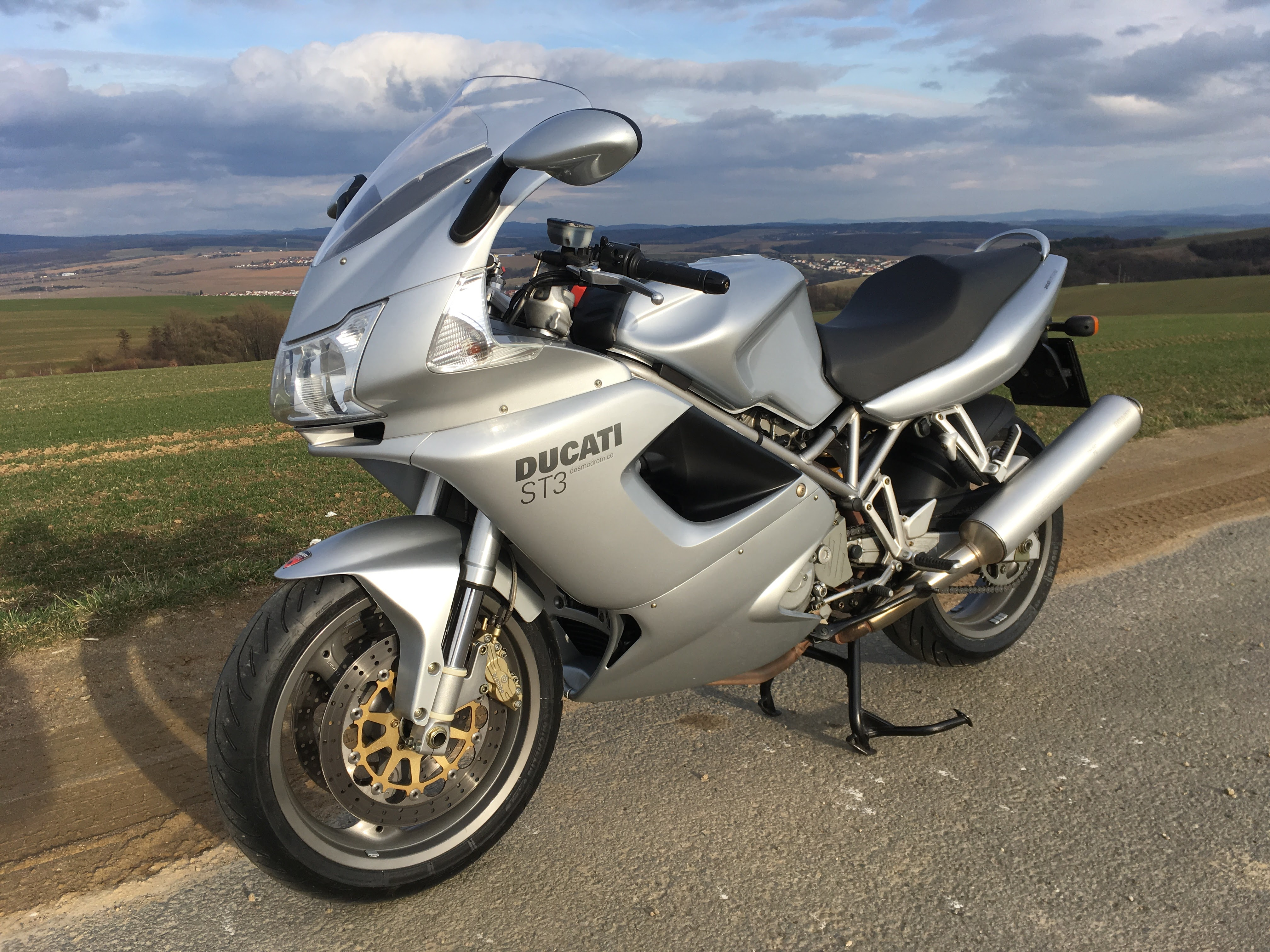 My ST3 on dirt road near Halenkovice village